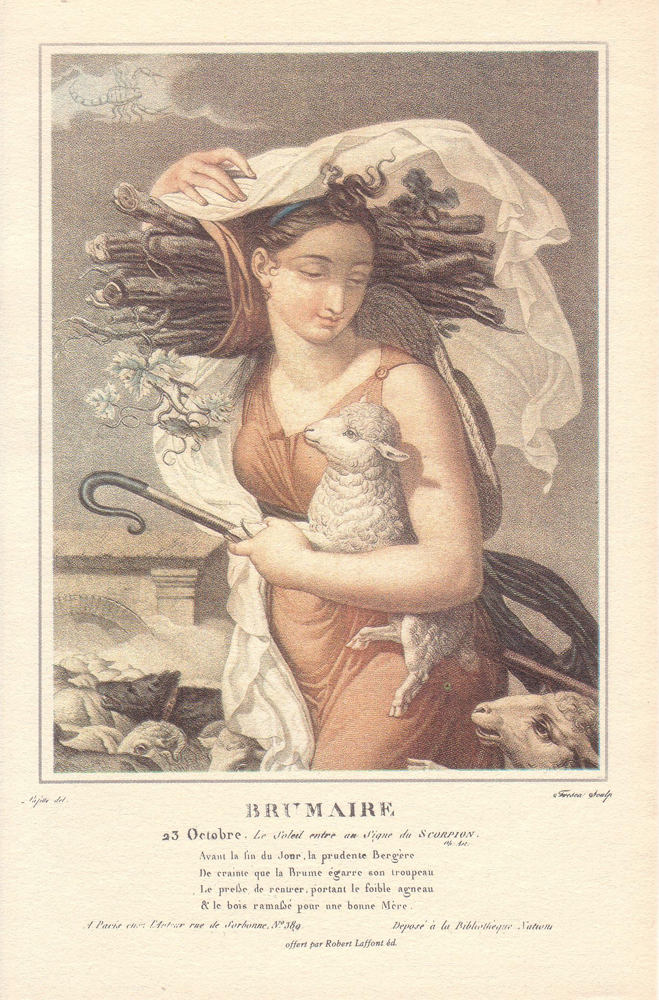 French Revolutionary Calendar BRUMAIRE 23 octobre: Le Soleil entre au signe du Scorpion Avant la fin du jour la prudente Bergère De crainte que la Brume égare son troupeau Le presse de rentrer, portant le faible agneau & le bois ramassé pour une bonne Mère